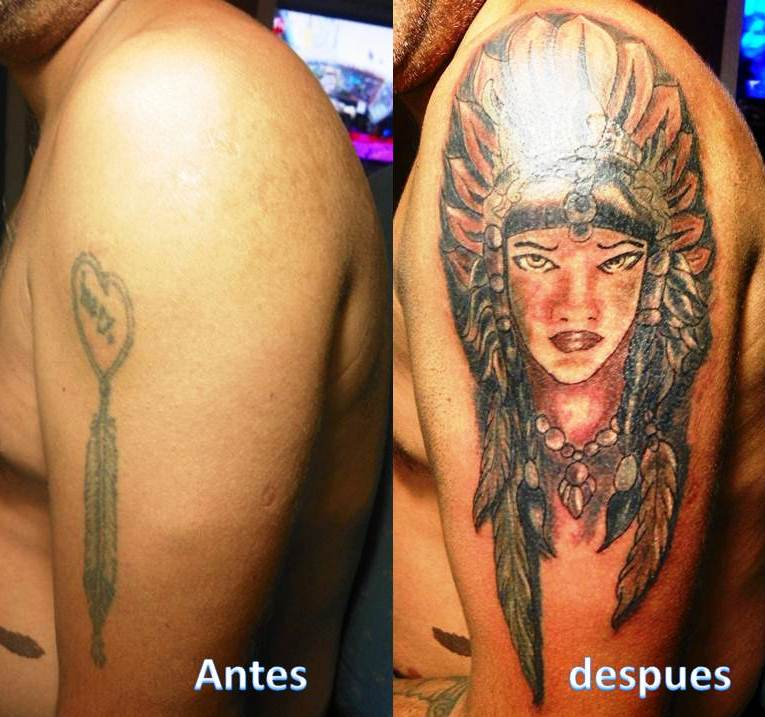 tatuaje realizado por cristian cordova tattoo del mono chile